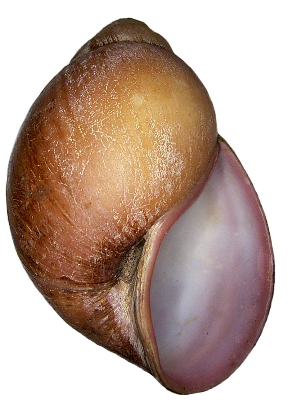 Familie: Achatinidae Groesse: 100 mm Verbreitung: Zaire Photo: U.Schmidt, 2007